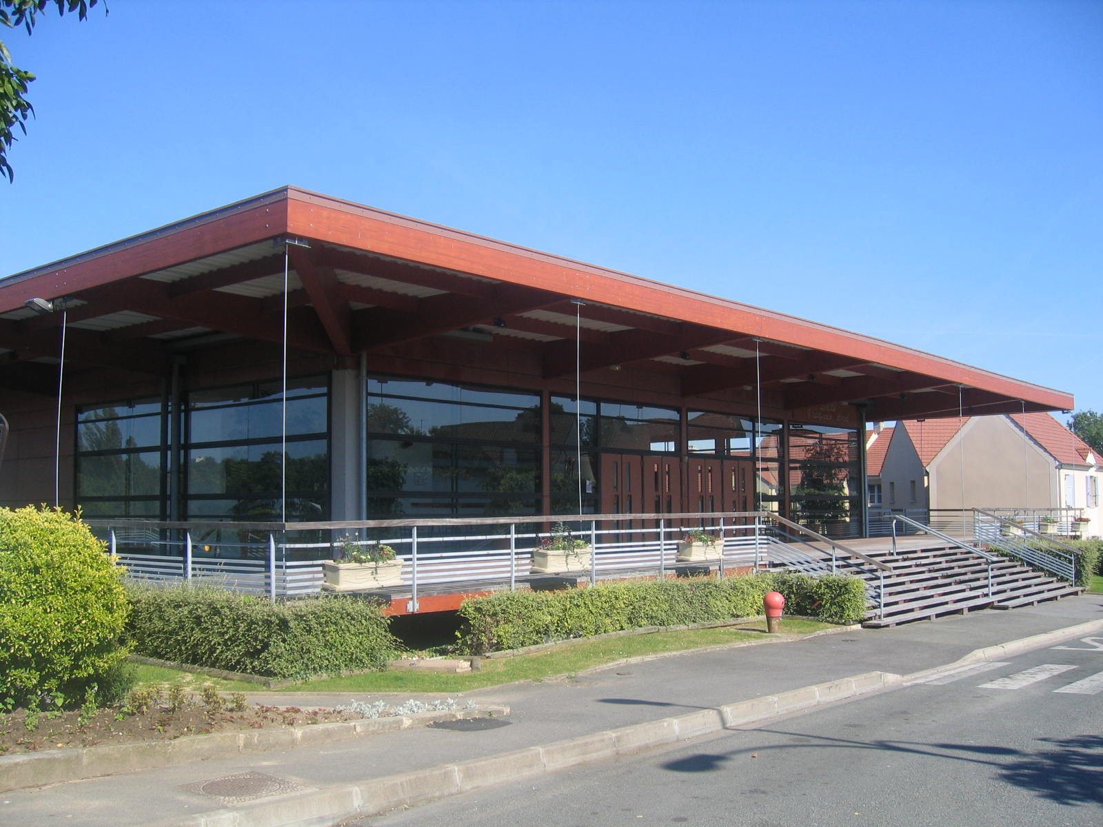 Champs-sur-Marne (Seine-et-Marne,Île-de-France, France) : Salle de spectacle Jacques Brel.